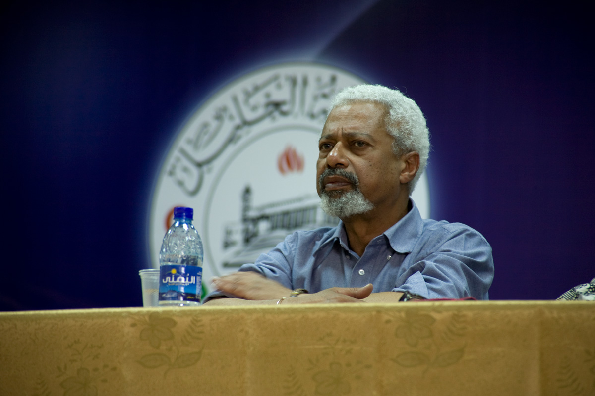 Abulrazak Gurnah on Hebron Panel